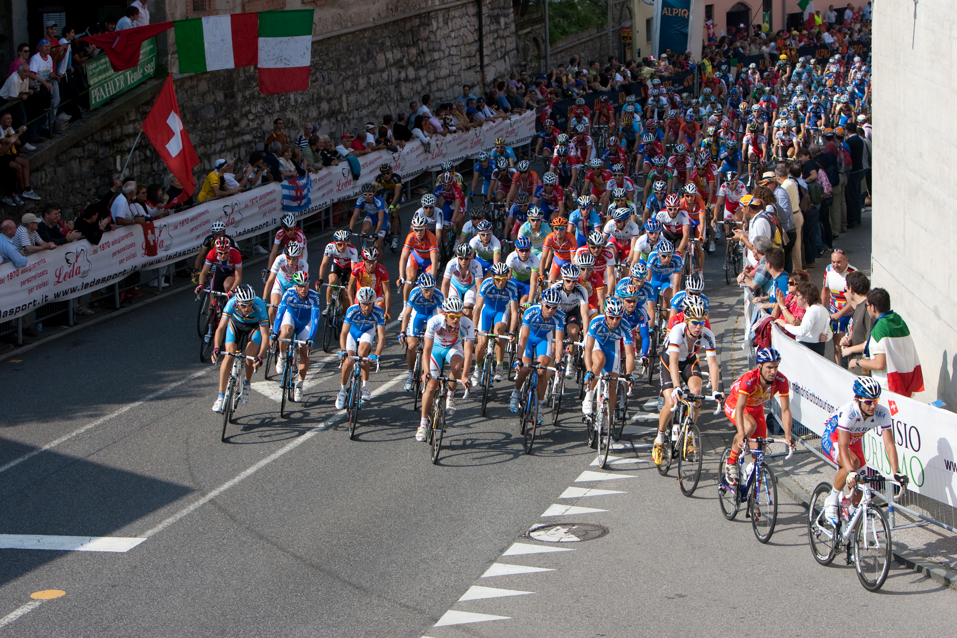 Épreuve élite, le peloton aux championnats du monde de cyclisme à Mendrisio en 2009.